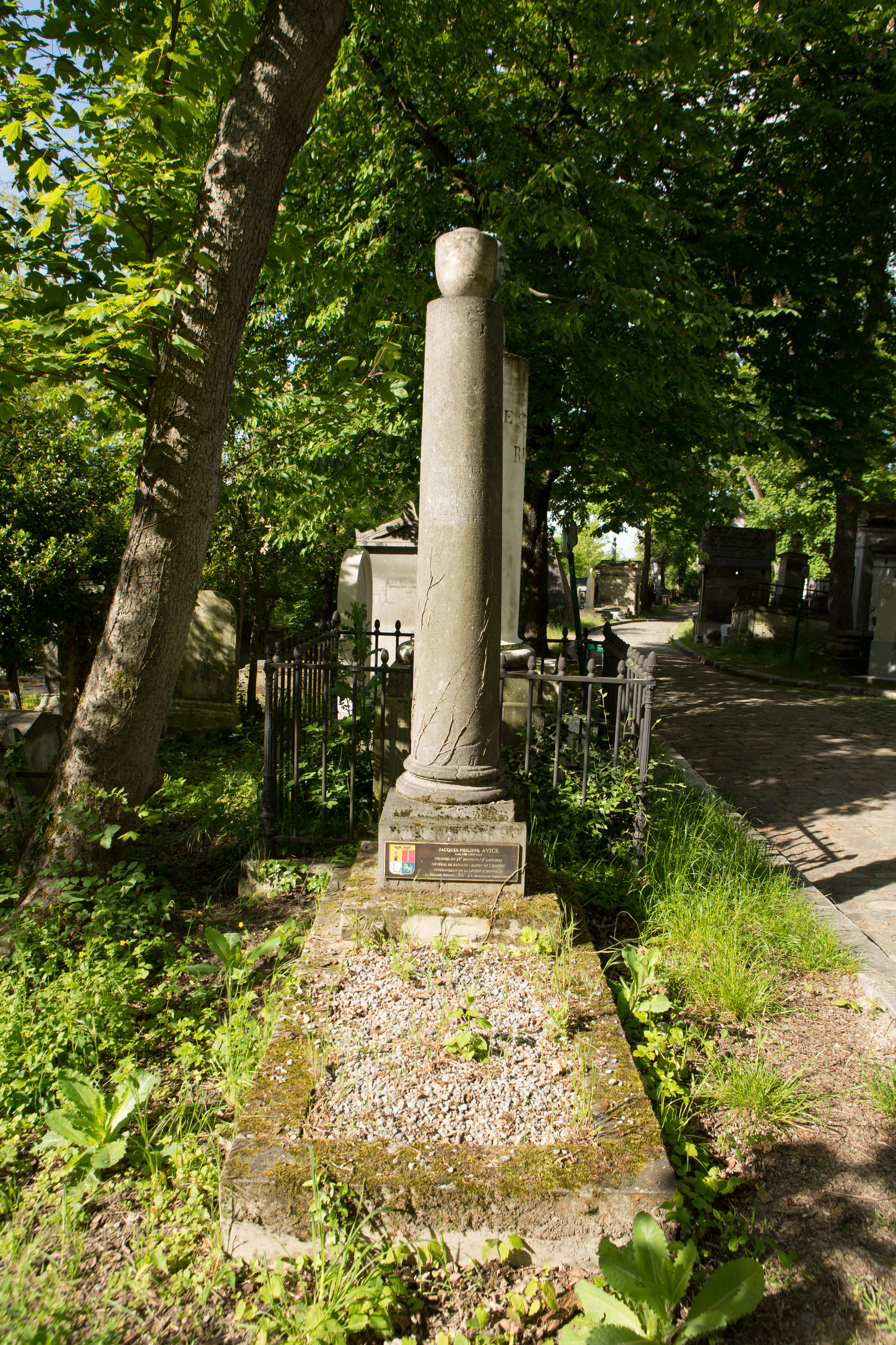 Sépulture du général Jacques Philippe Avice (1759-1835). Colonne ornée d'une urne.